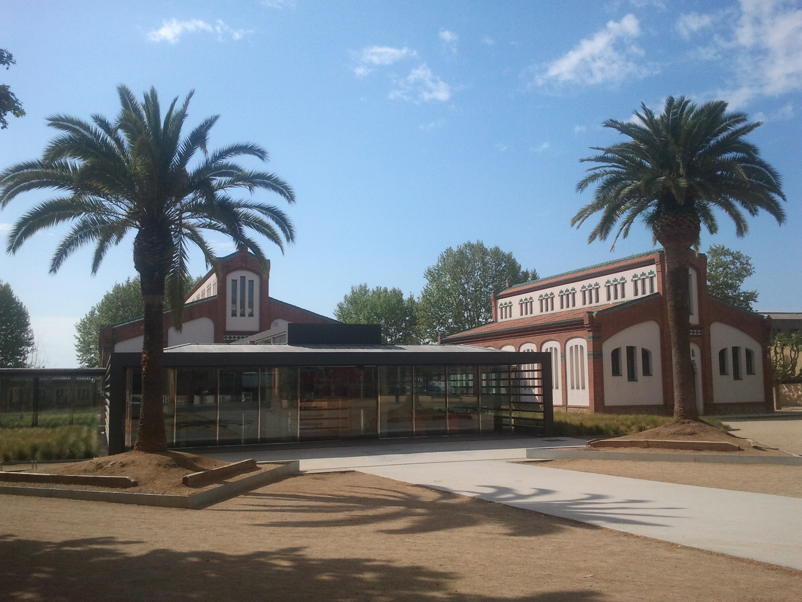 Biblioteca Pública Antoni Comas, al Pati de l'Escorxador de Mataró